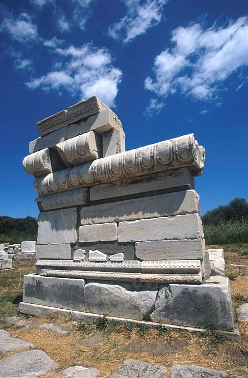 Motiv: Mauerfragment des Heraions auf Sámos, Griechenland Fotograf: Agon S. Buchholz (asb) Aufnahmedatum: 16-Aug-2002 Kamera: Minolta Dynax 9 Lizenz: GNU FDL